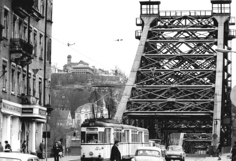 Dresden, Elbbrücke "Blaues Wunder", Straßenbahn ADN-ZB Hiekel 9.4.1985 Dresden: Brückenrekonstruktion-Die Dresdner Hängebrücke, weithin unter dem Namen "Blaues Wunder" bekannt, ist ab 9.4. für den Straßenverkehr gesperrt. Das technische Denkmal aus dem Jahre 1893 wird umfangreich rekonstruiert. Die Arbeiten nehmen ungefähr zwei Jahre in Anspruch. Künftig soll das Bauwerk als eine der sieben Brücke der Elbmetropole wieder genutzt werden.